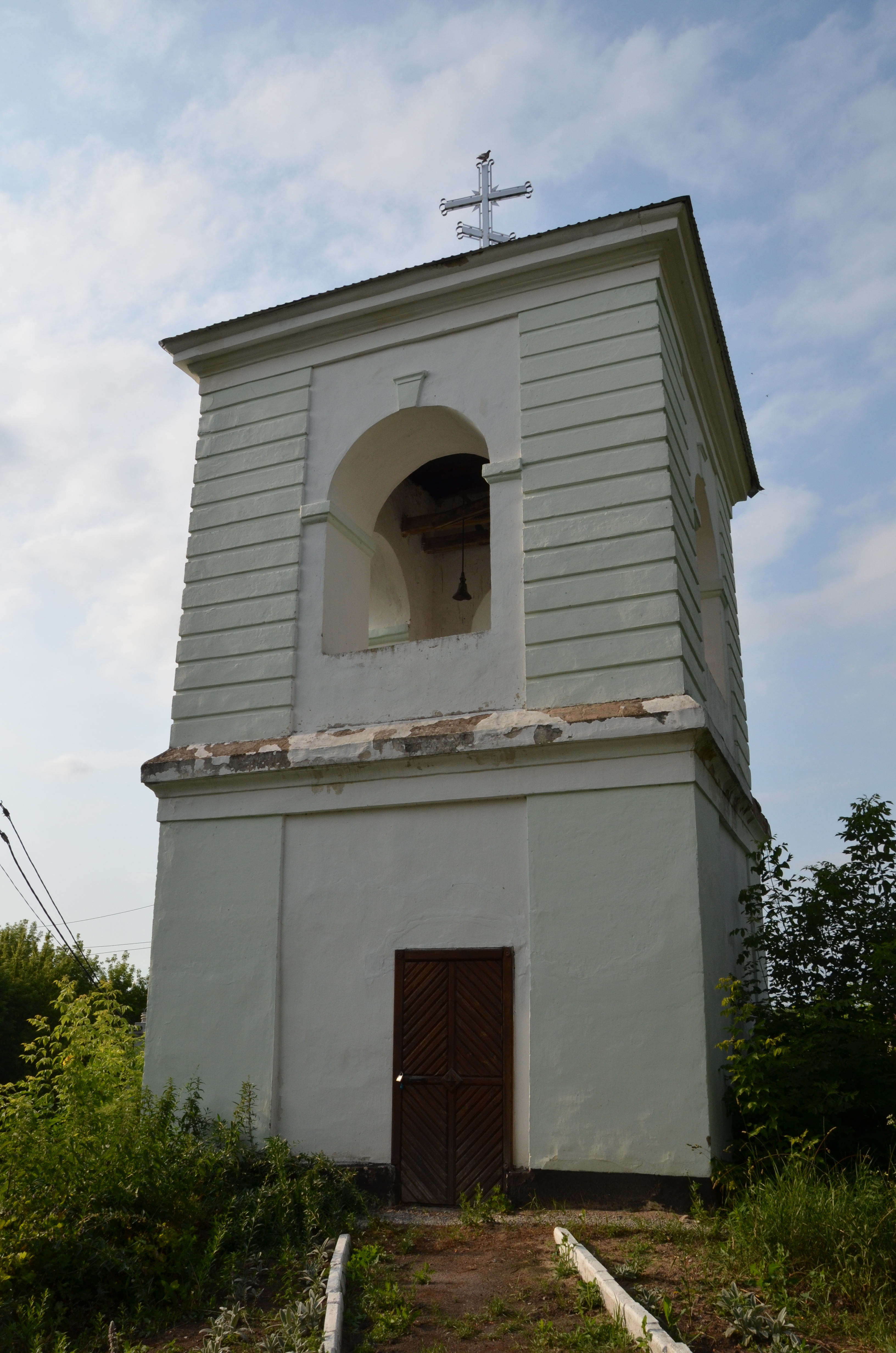 Дзвіниця Троїцького костелу (мур.), с.Ліщин